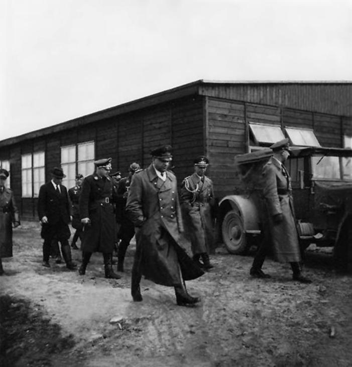 Garnizon Praschnitz (Przasnysz), 1941r. Inspekcja na lotnisku Generalleutnanta Hermana Brucha, któremu towarzyszy Komendantur E 35/XI Praschnitz Oberst Heinrich Rauch - Fliegevhorst